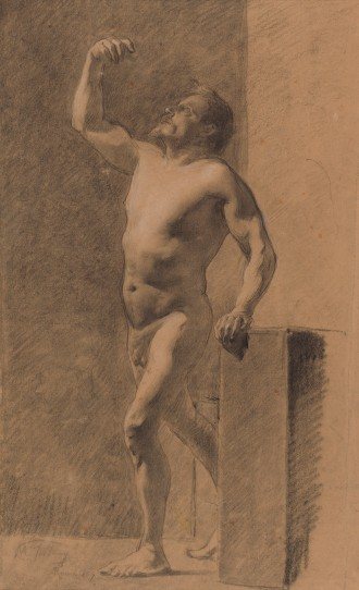 Desnudo masculino. Dibujo académico lápiz graso sobre papel, realizado por Mariano Fortuny y Marsal en su primer viaje a Roma. 43 x 26 cm. Fundación Mapfre de Madrid. c. 1858